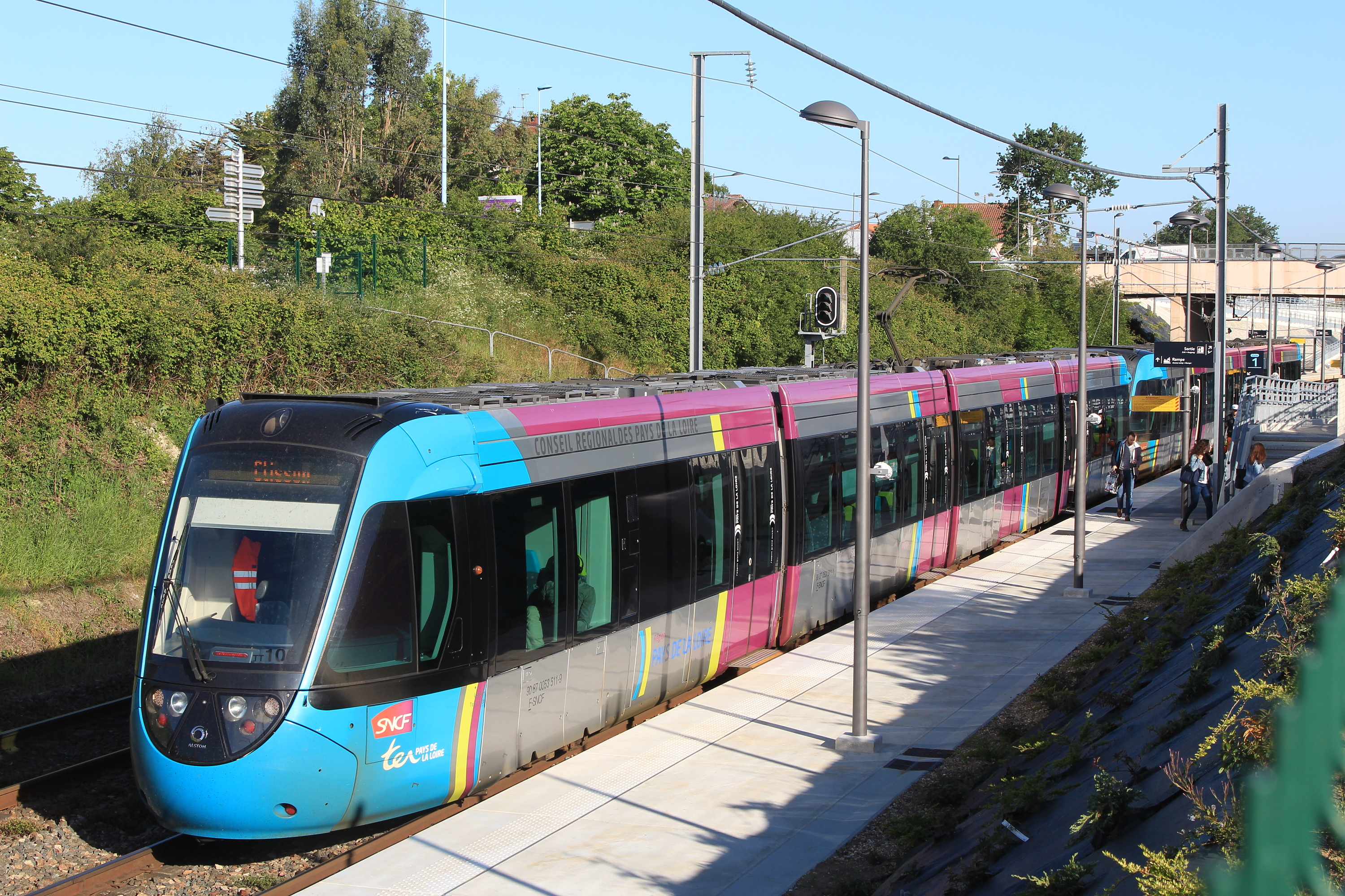 Deux trams-trains marquent l'arrêt dans la nouvelle halte de Gorges, en assurant le TER 859705 (Nantes - Clisson) de 8h51.